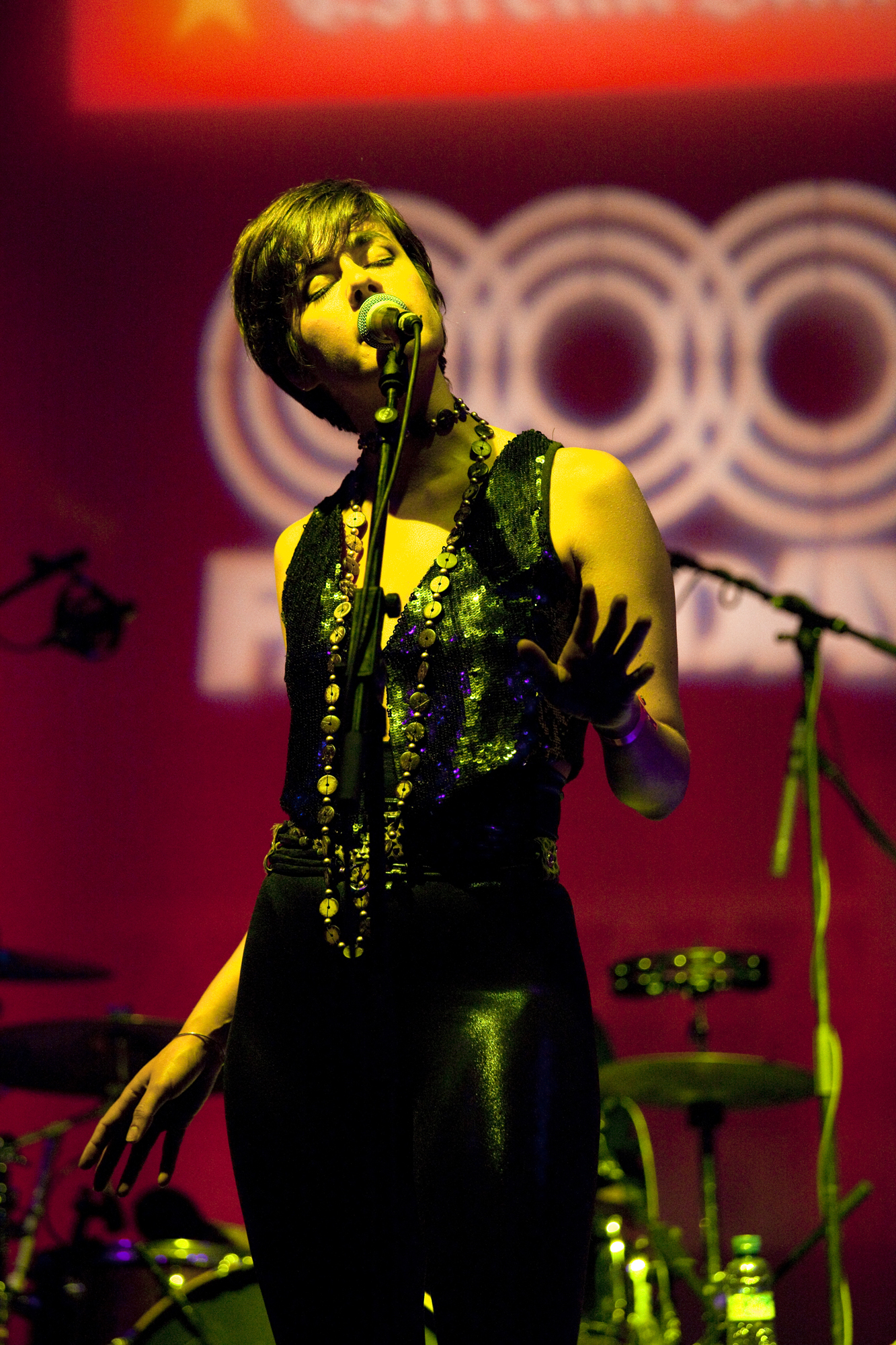 Maika Makovski